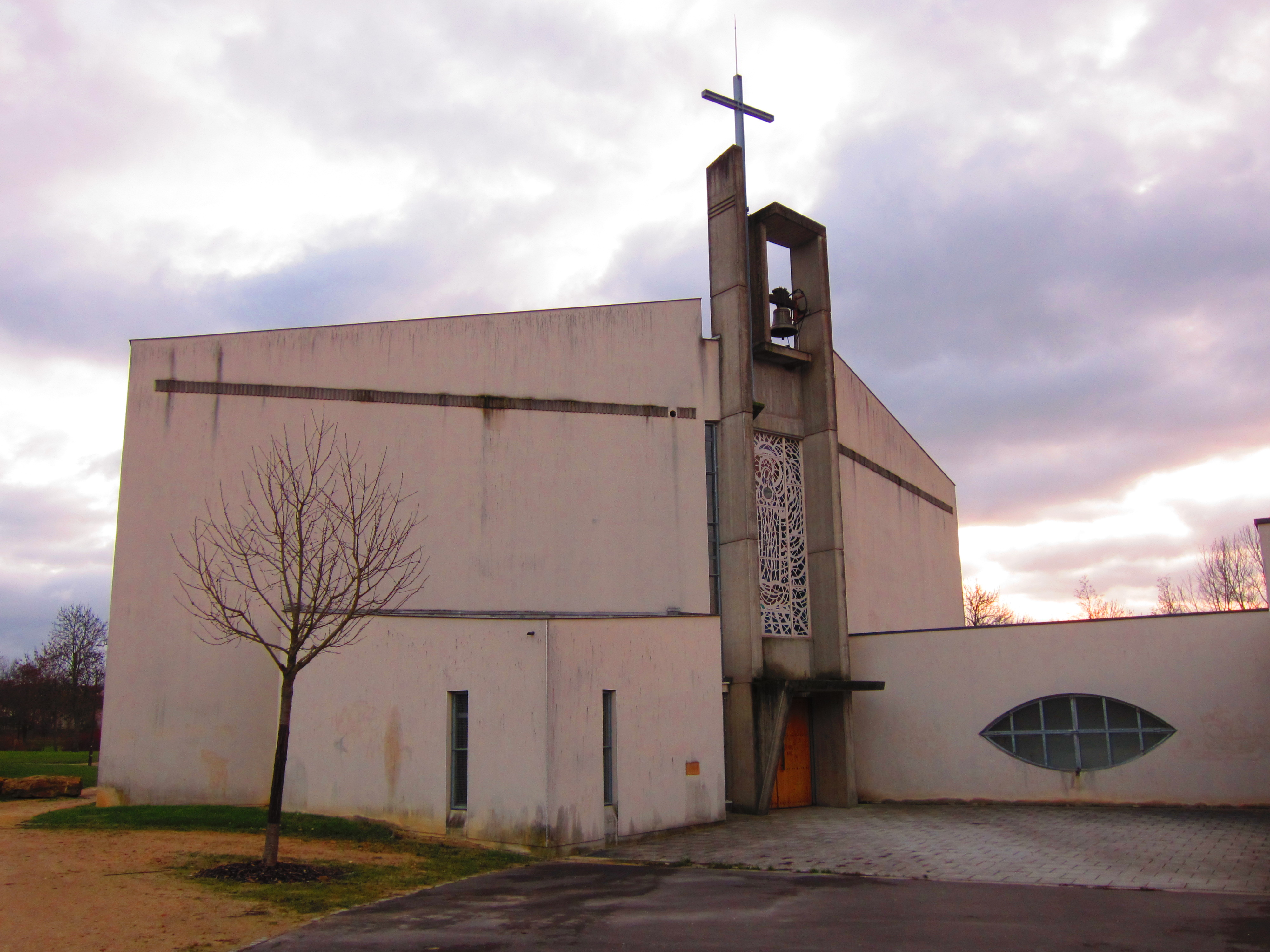 Metz Eglise notre-Dame-de-la-Confiance grange aux bois